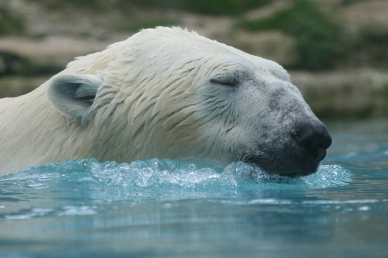 Emmanuel FAIVRE - 2005 - Pris au zoo d'Amnéville